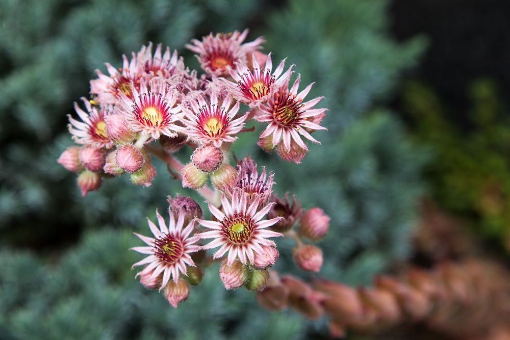 Bluete einer Dach-Hauswurz (Dachwurz)